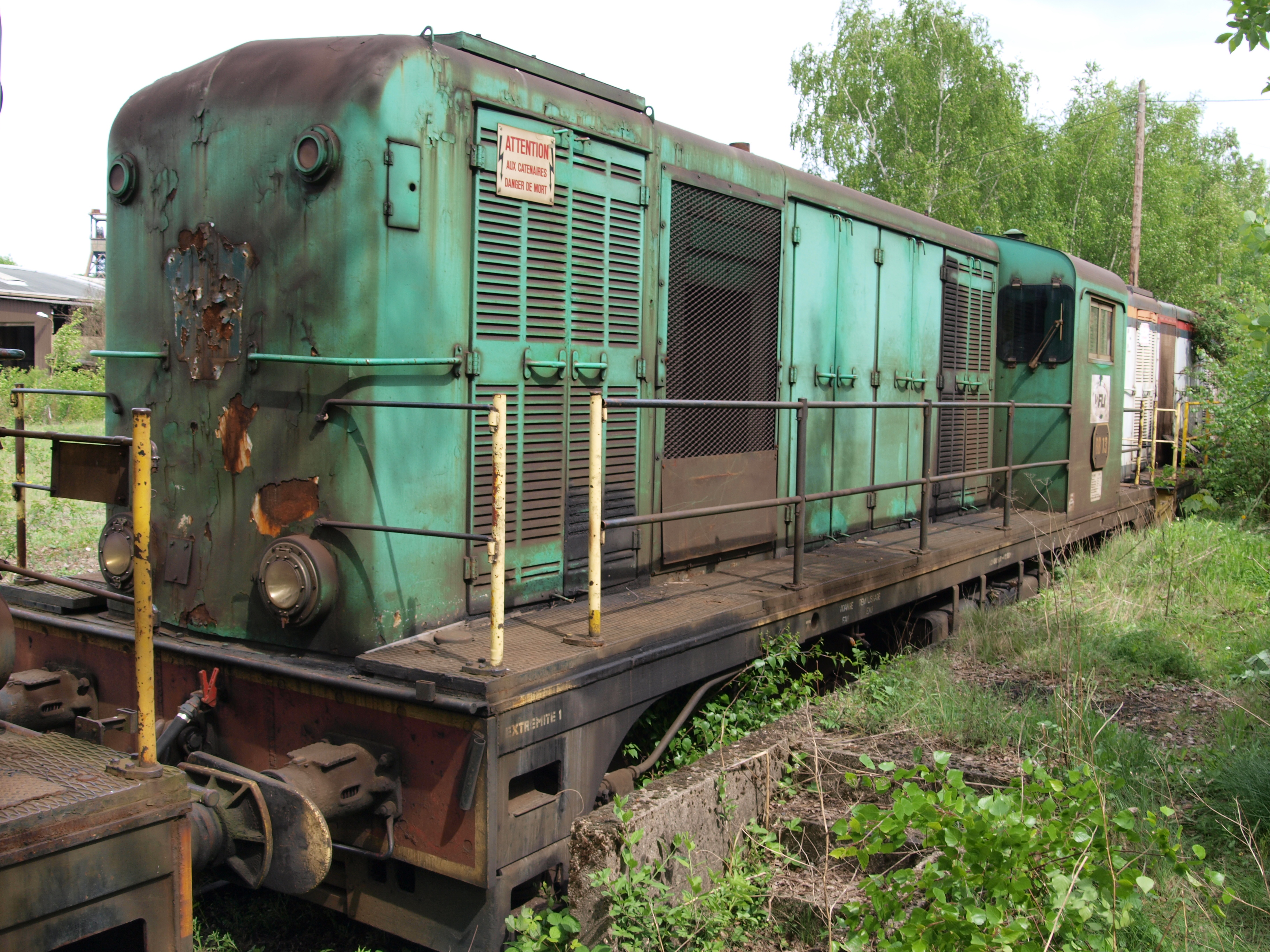 VFLI Cargo BB13 diesel locomotive at Petite-Rosselle